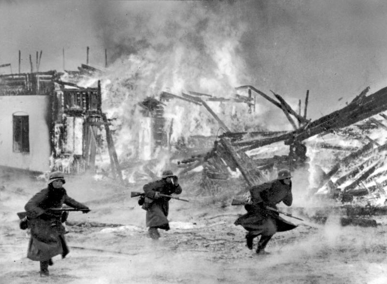 ADN-ZB/ Archiv II. Weltkrieg 1939-1945 Intervention der Deutschen Wehrmacht in Norwegen am 9. April 1940. Deutsche Truppen in erbittertem Kampf gegen norwegische Truppenteile in einem Dorf, 40 km westlich Lillehammer. 4556-40 PK.: Borchert